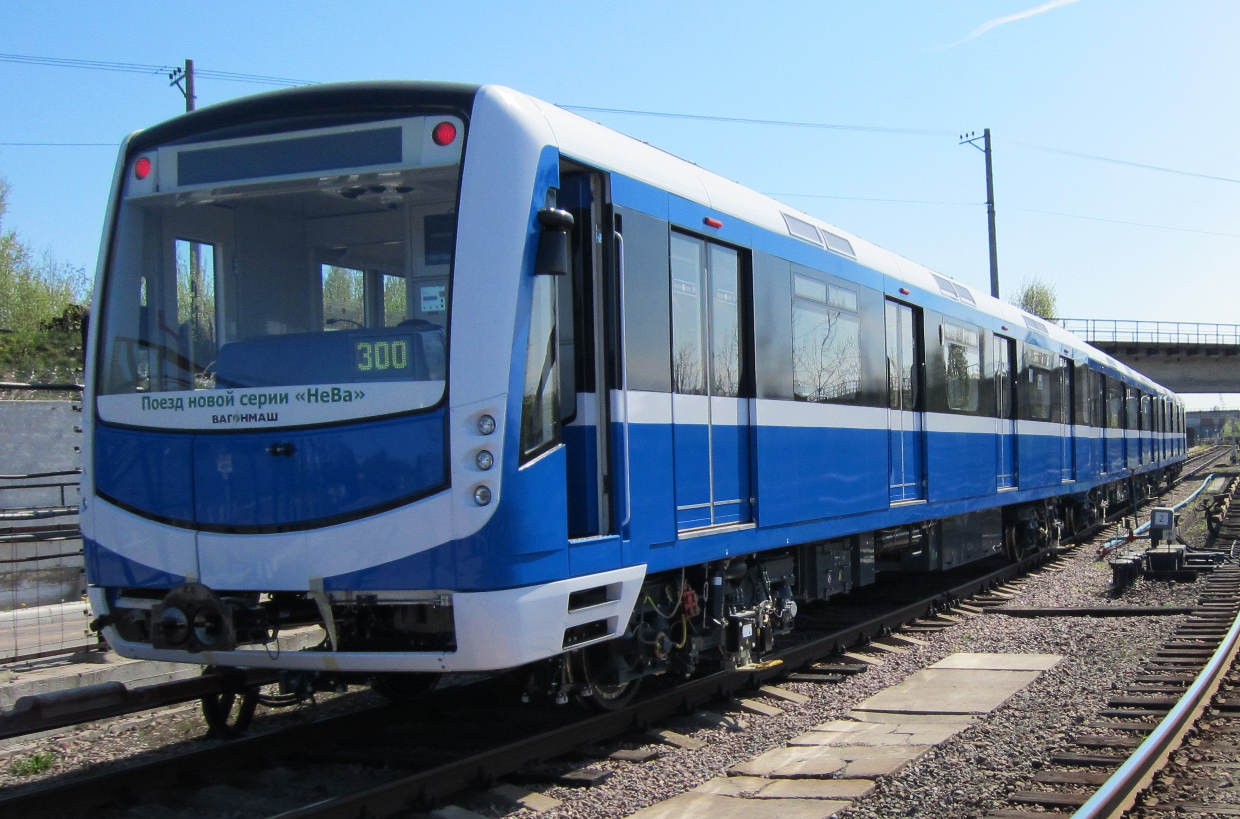 Электросекция из вагонов метрополитена моделей 81-556, 81-557 и 81-558 проходит обкатку на деповских путях в электродепо «Невское»